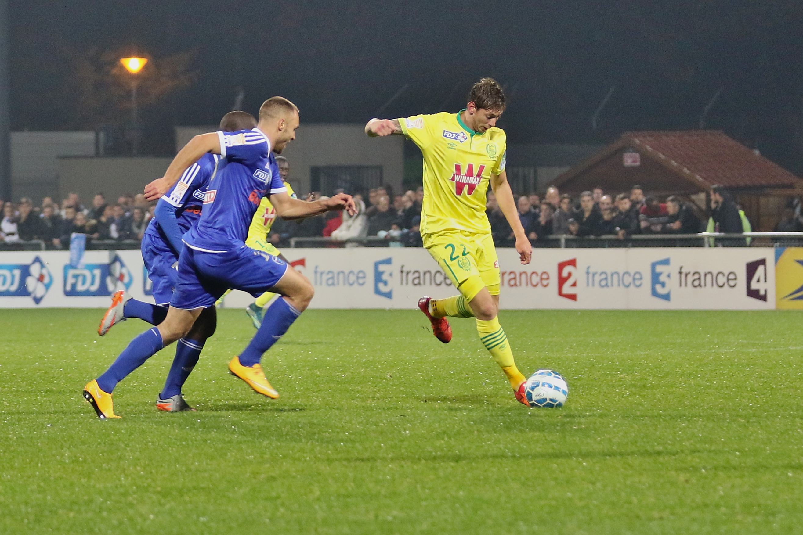 FBBP01 - FCN - 20151028 - Coupe de la Ligue - Sala Emiliano